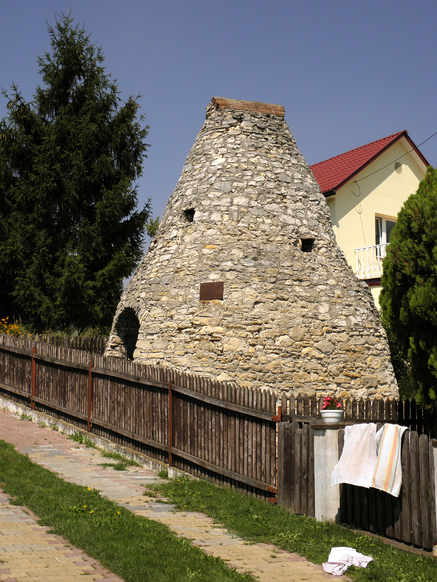 Iłża, ul. Wójtowska 63 - piec garncarski (zabytek nr 144/A oraz 345/A)